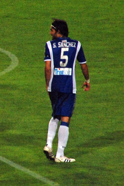 Sergio Sánchez Ortega en el partido Espanyol-Villareal.